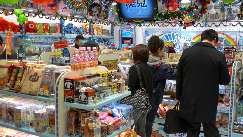 東京キャラクターストリート [1]